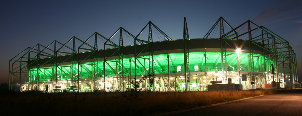 Stadion im Borussia Park bei Nacht